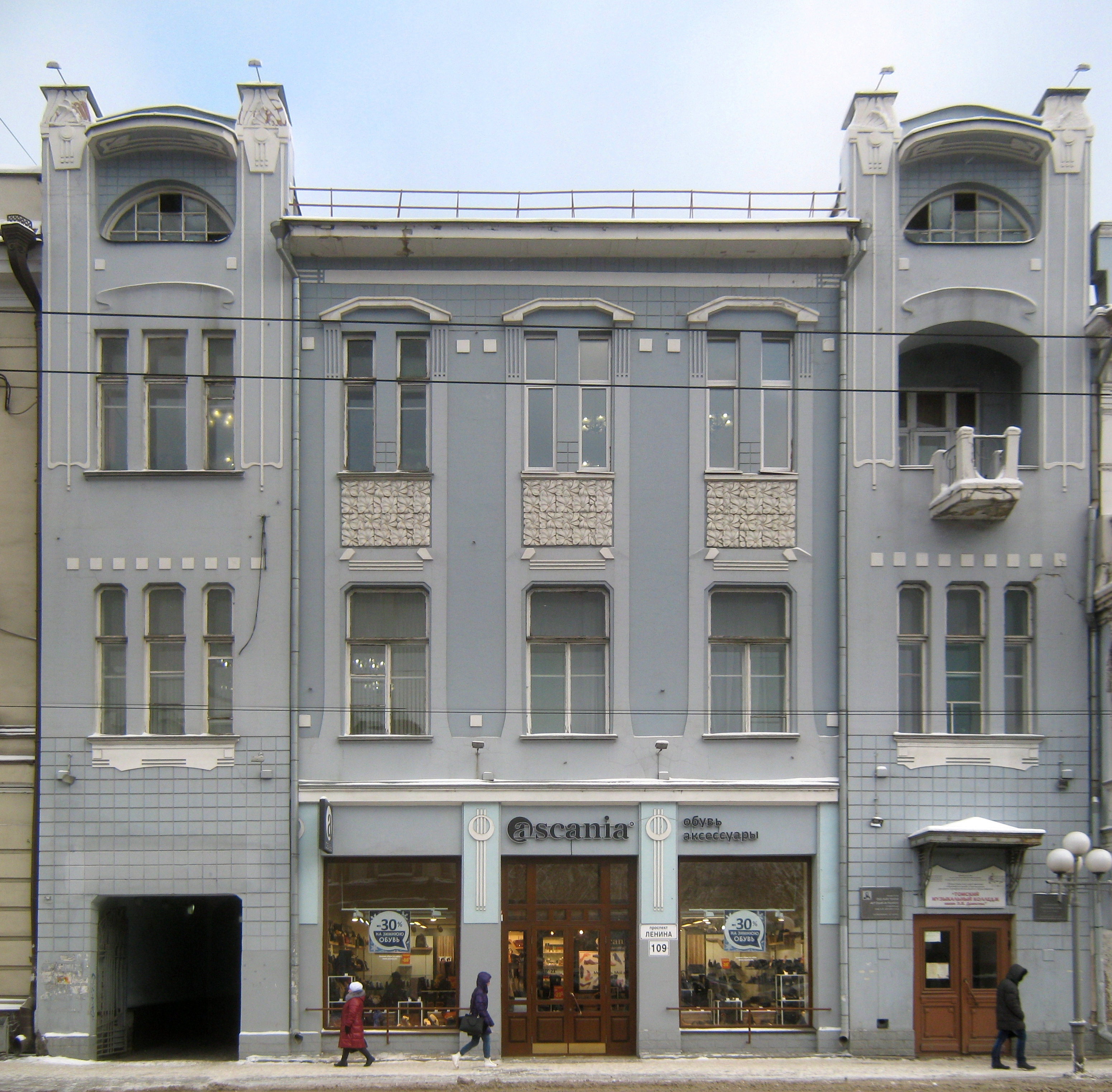 Здание Сибирского торгового банка.